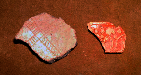 Foto de una Terra Sigillata Gálica ( romana )y un fragmento de incisa cruciforme ( I Edad del Hierro )